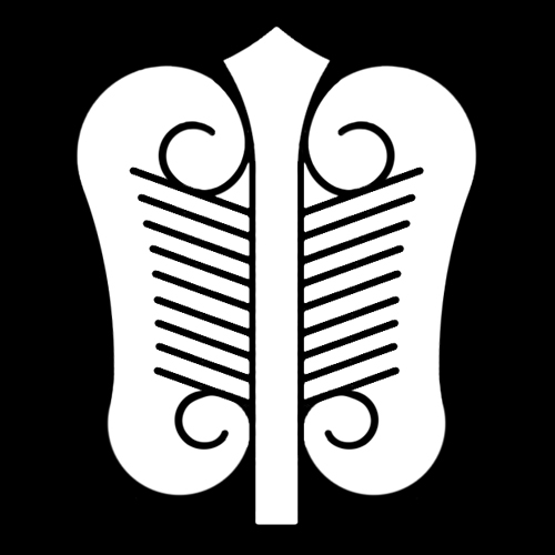 「軍配扇」紋（染抜）